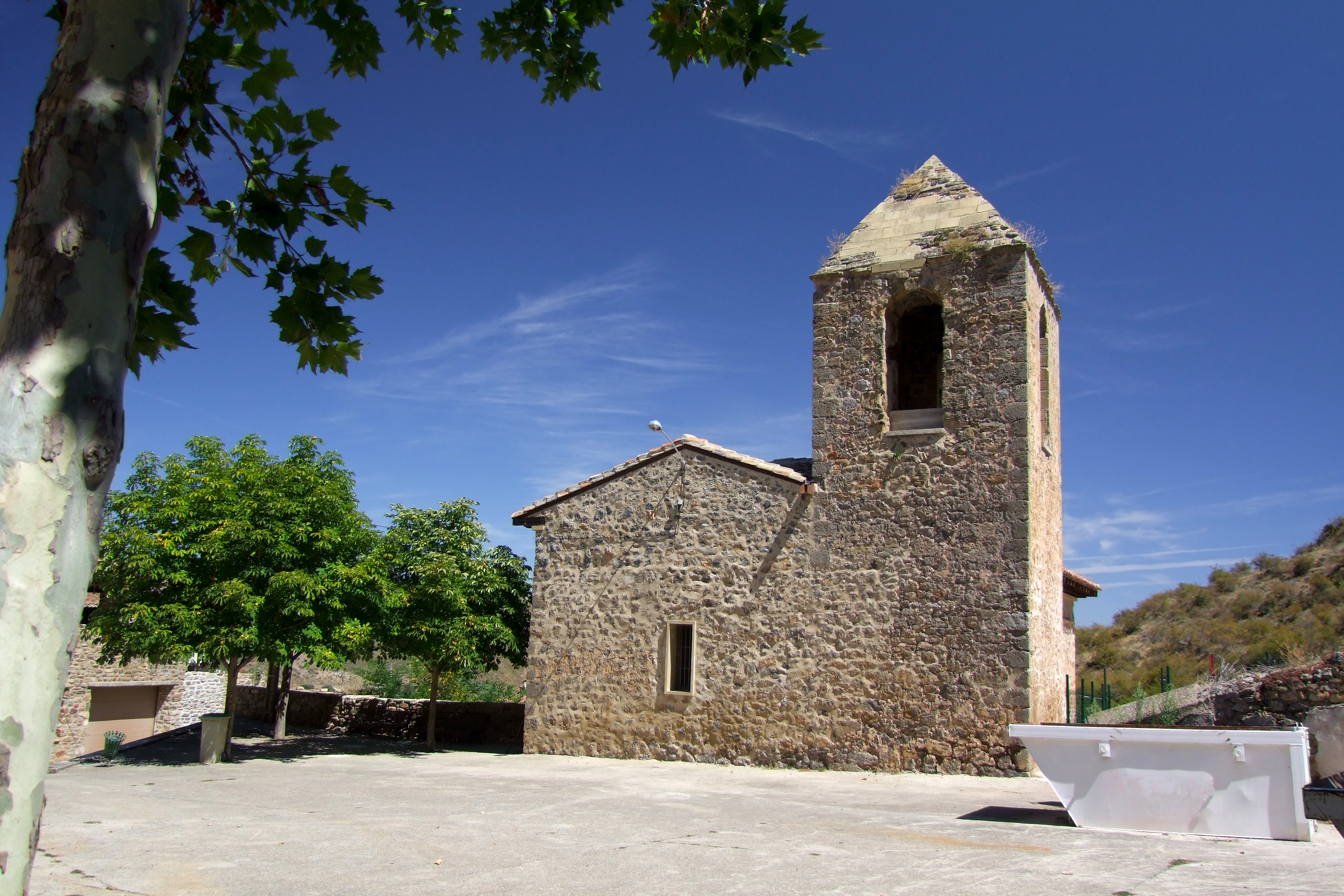 Iglesia de San Bartolomé en la localidad de San Bartolomé, La Rioja - España